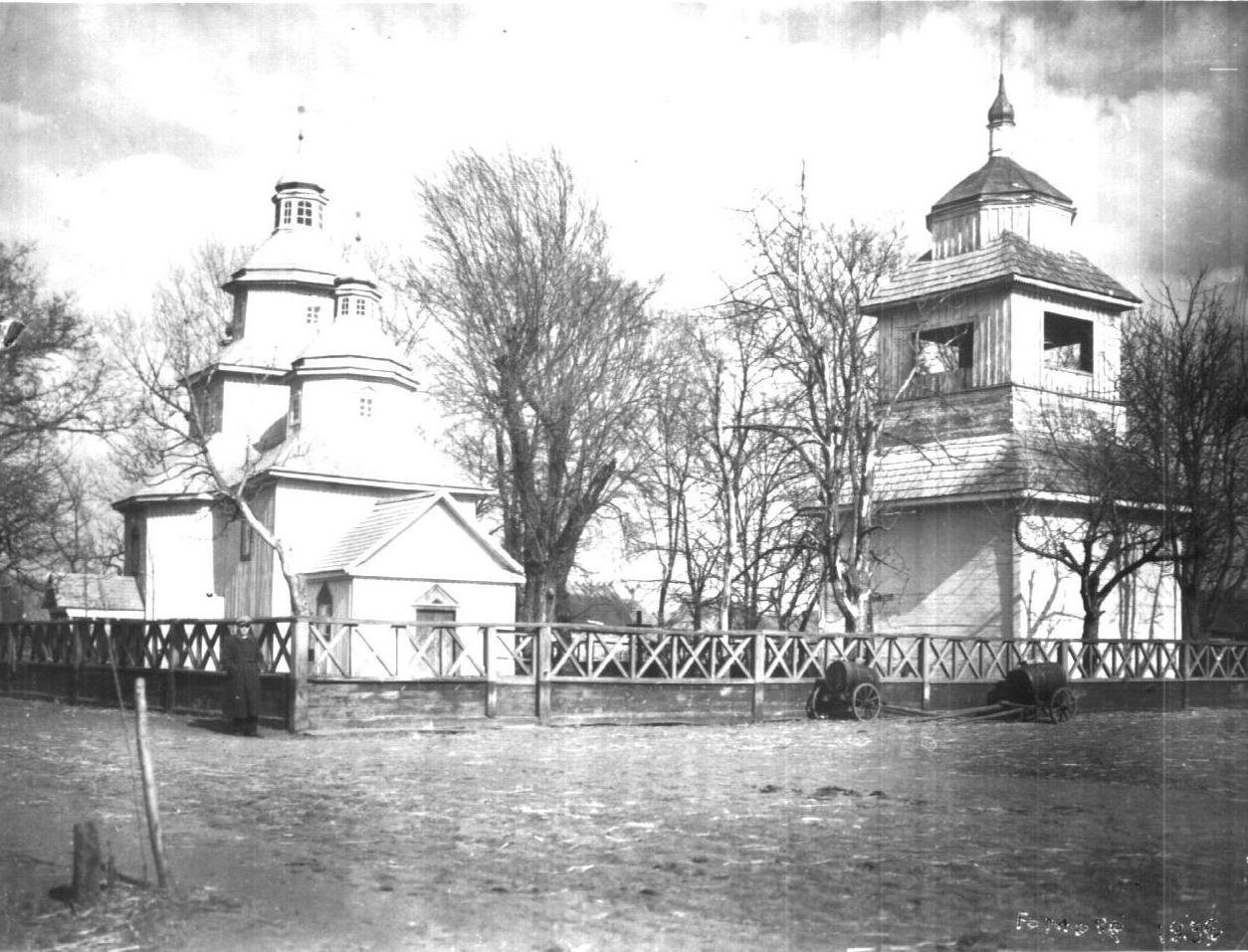 Беларуская (тарашкевіца): Рубель (Rubiel). Царква